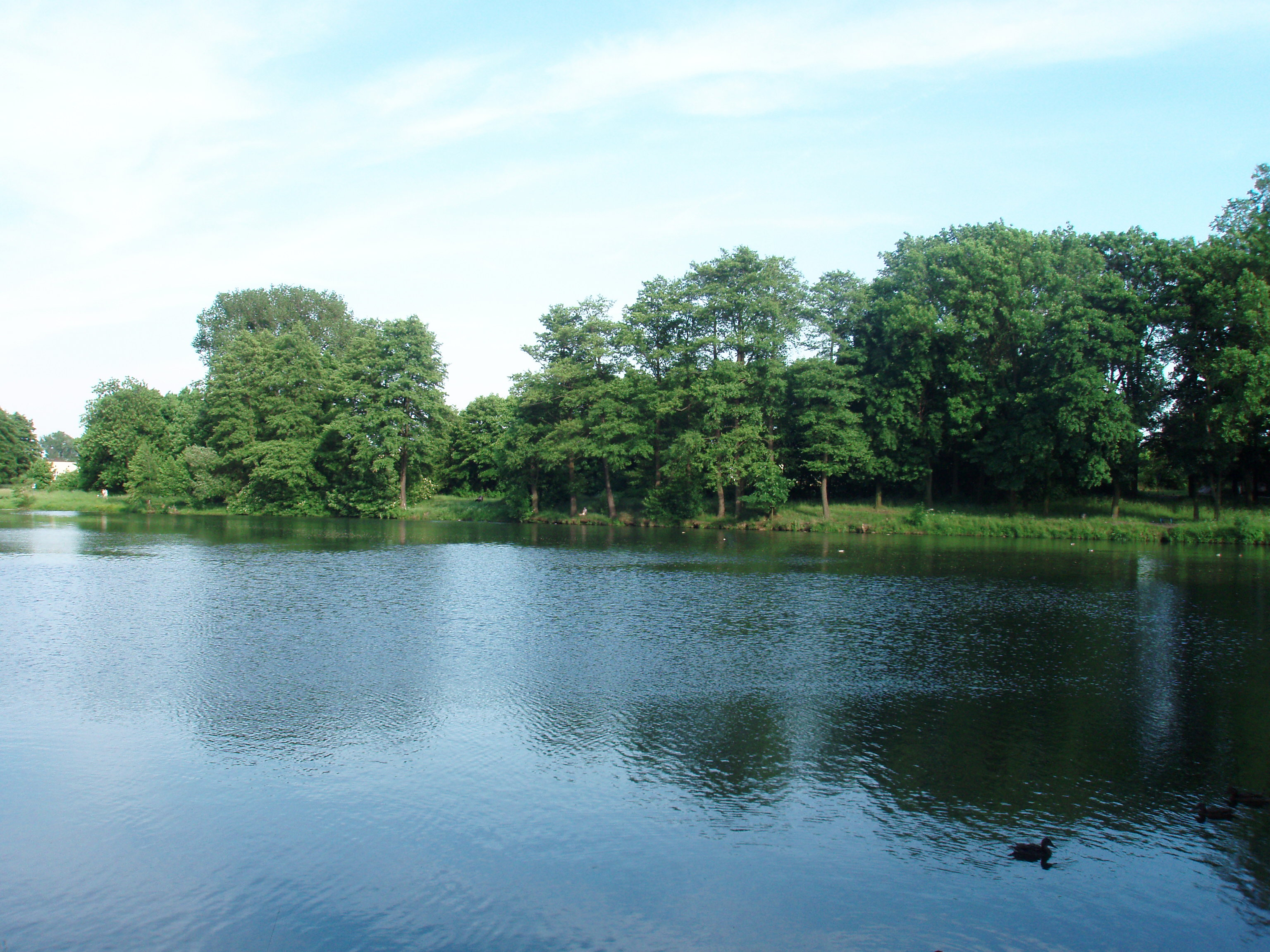 Park na Młynku w Łodzi, widok od strony ul. Śląskiej